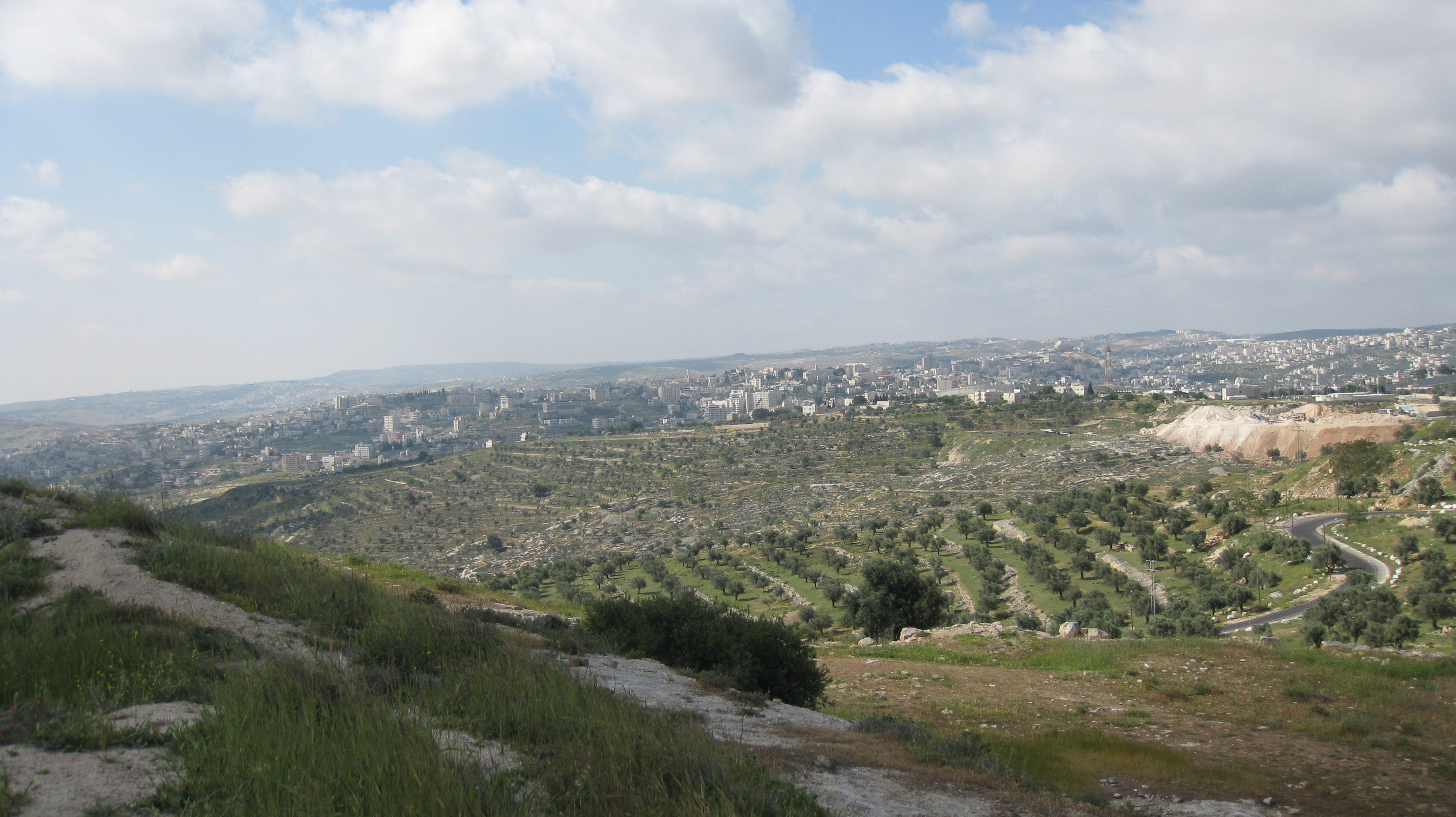 Views from Givat HaArbaa, near Hebron road, Jerusalem הנוף מגבעת הארבעה, מזרחית לדרך חברון ודרומית לרמת רחל, ירושלים